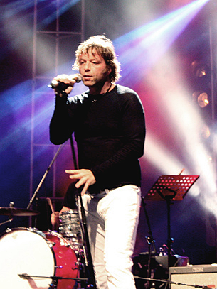 Français cadien: Daniel Boucher le 14 août 2010 au festiblues de Montréal.